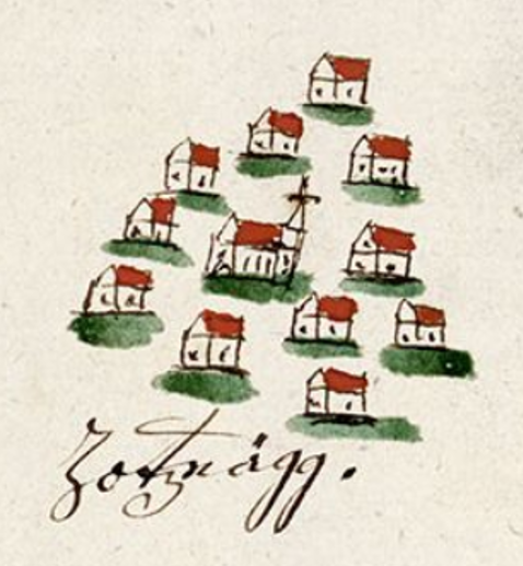 Deutschland (D) - Baden-Württemberg (BW) - Landkreis Konstanz (KN) - Mühlingen: Zoznegg in einer Karte von 1760 (Ausschnitt)